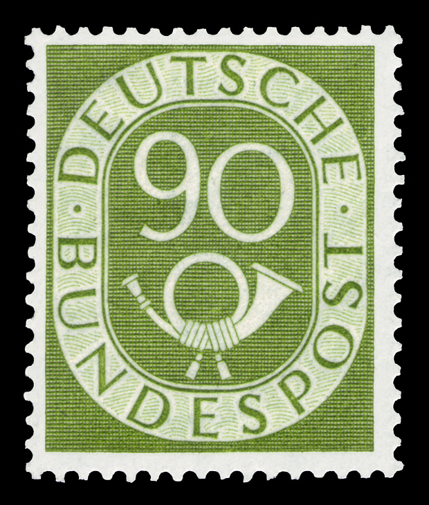 Stamp description / Briefmarkenbeschreibung Posthorn-Serie Ausgabepreis: 90 Pfennig First Day of Issue / Erstausgabetag: 16. April 1952 Michel-Katalog-Nr: 138